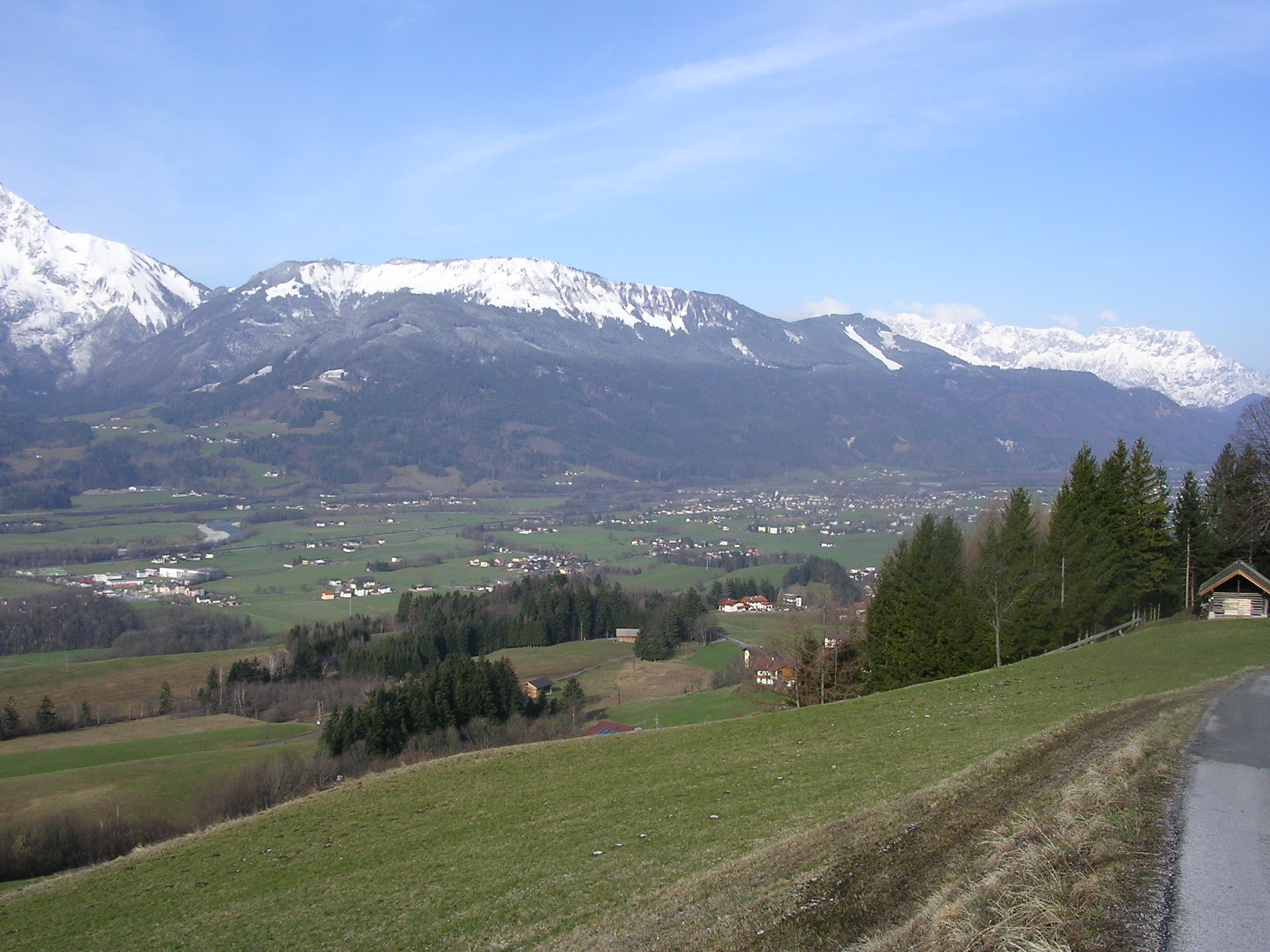 Salzachtal, Kuchl von Voregg, im Hintergrund der Untersberg